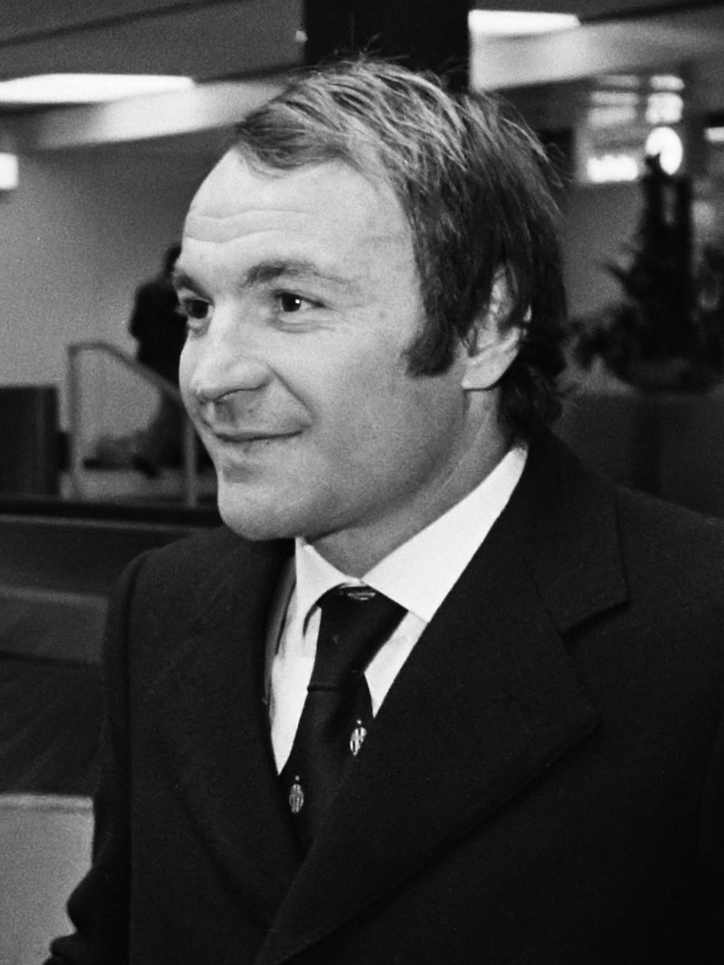 Elftal Juventus op Schiphol voor wedstrijd tegen Ajax (Europacup III ), trainer Parola (m) met doelman Zoff (l) en Altafini (r) 10 december 1974